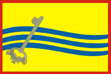 Прапор Житомирського району